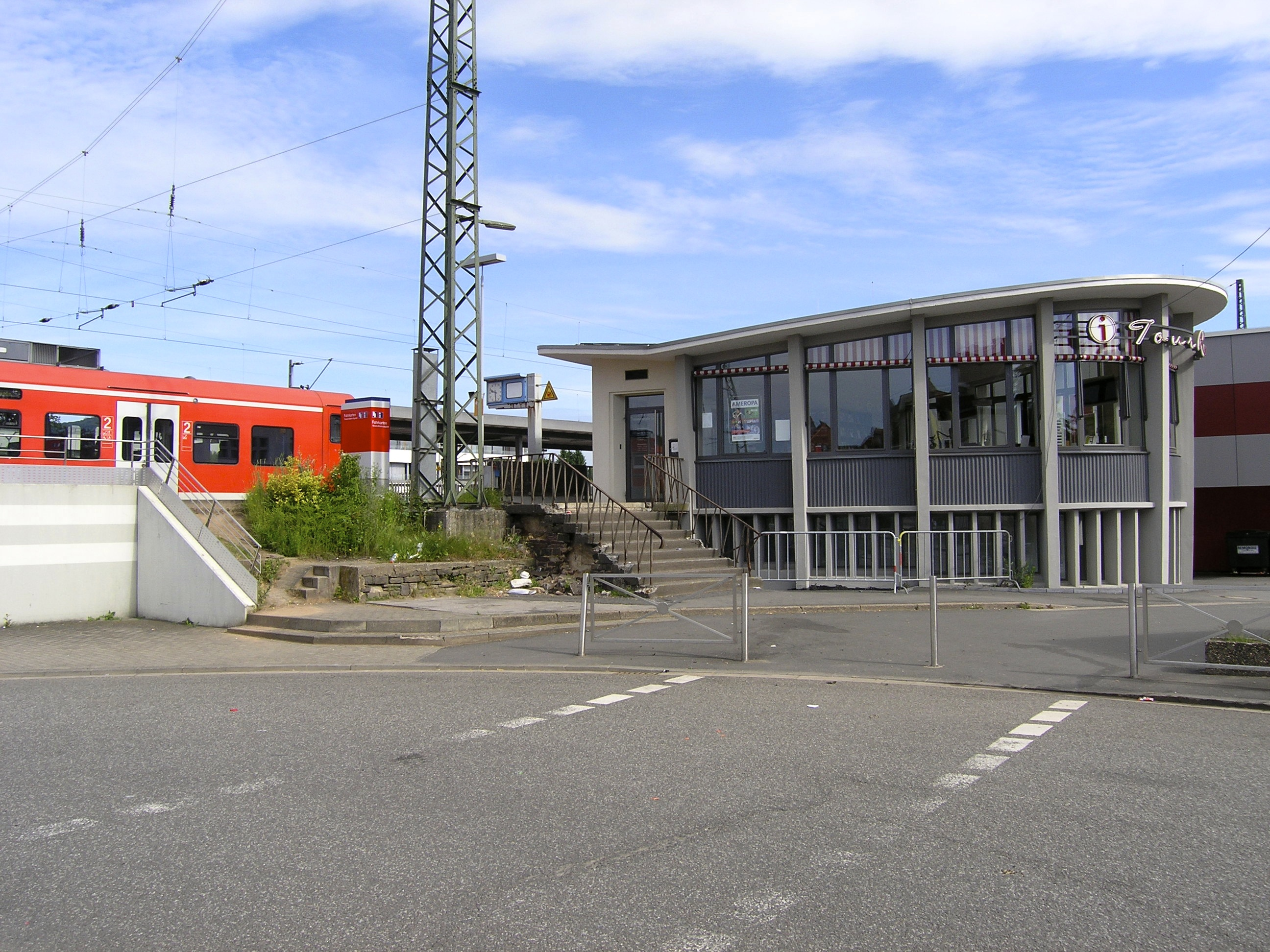 Der Busbahnhof (ZOB) in St. Wendel.